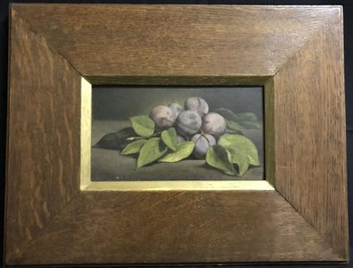 Nature morte aux prunes, par Alexandre Magenc, huile sur bois